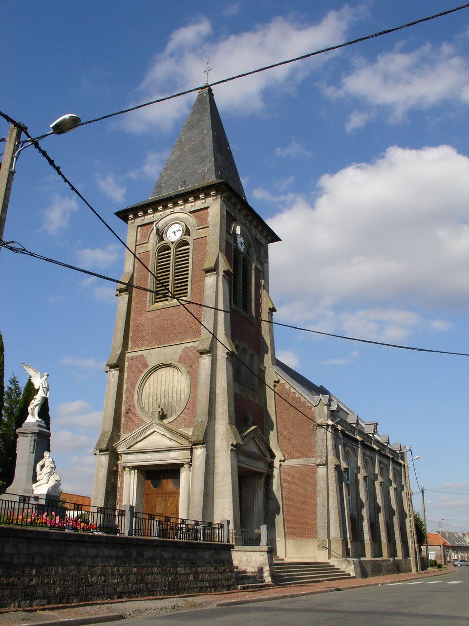 Église de Wailly